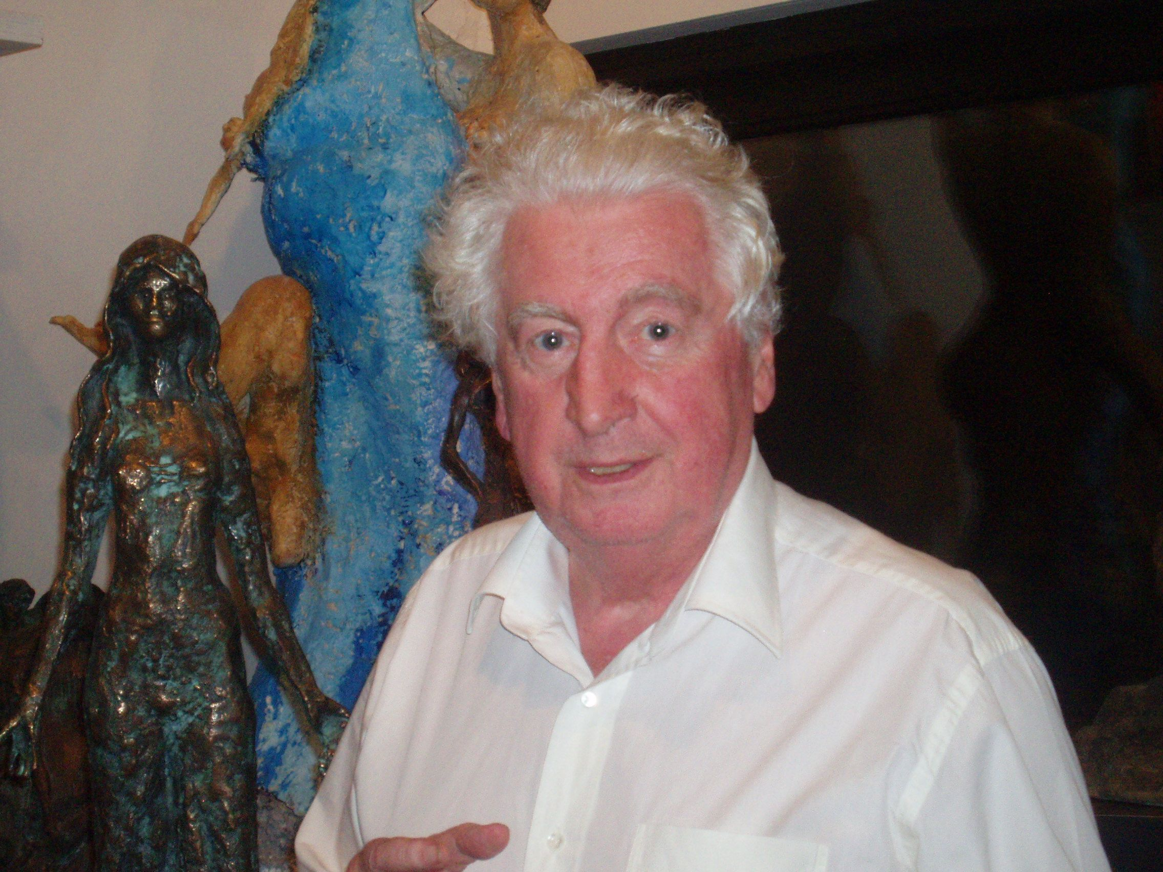 Portrait des Künstlers Hans Schröder